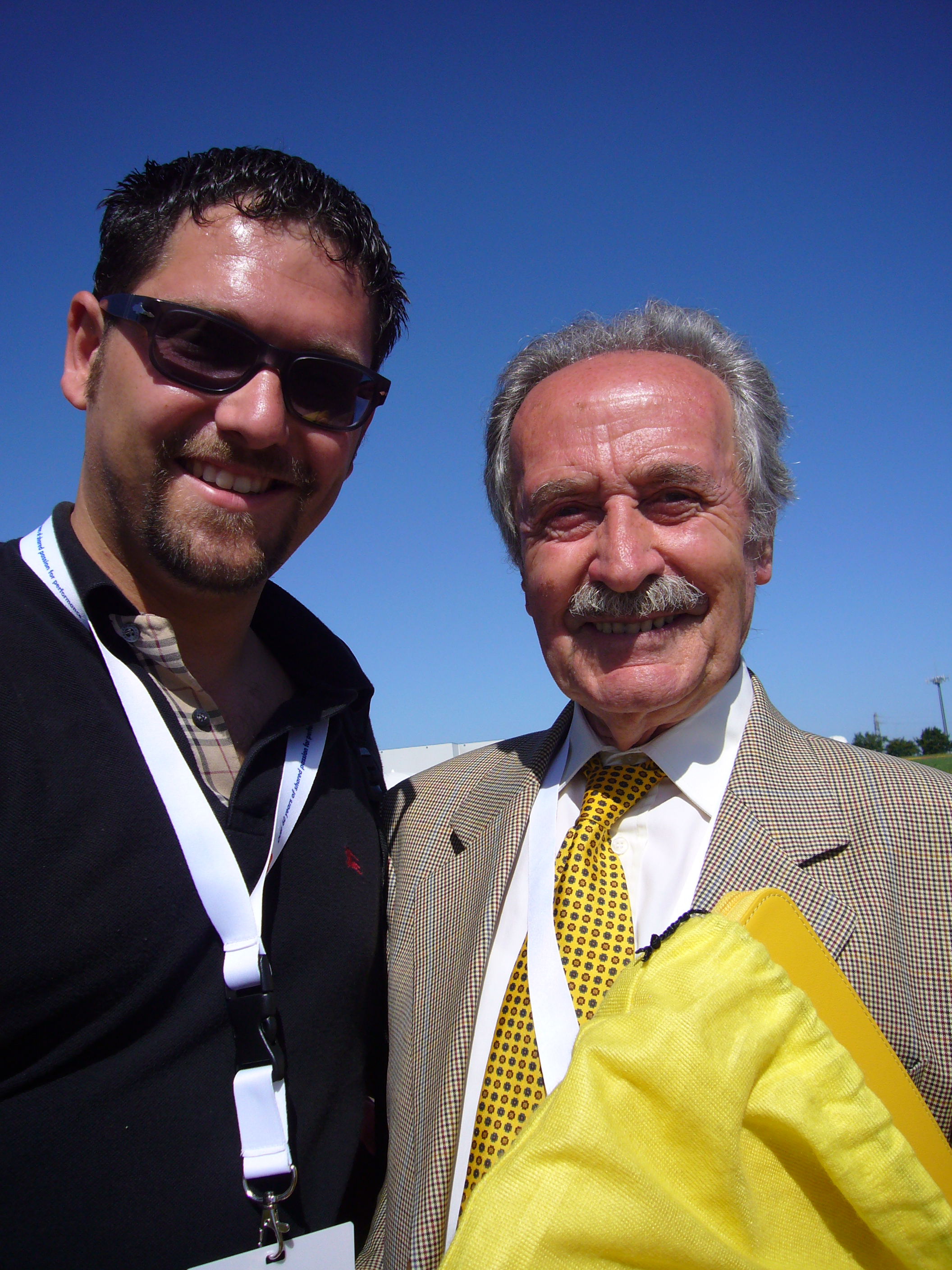 portrait